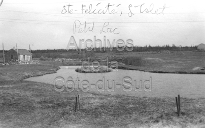 Propriété de la Société Historique de la Côte-du-Sud, épreuve n&b Cote: F212/1/5/1.173 Réf.: 05607